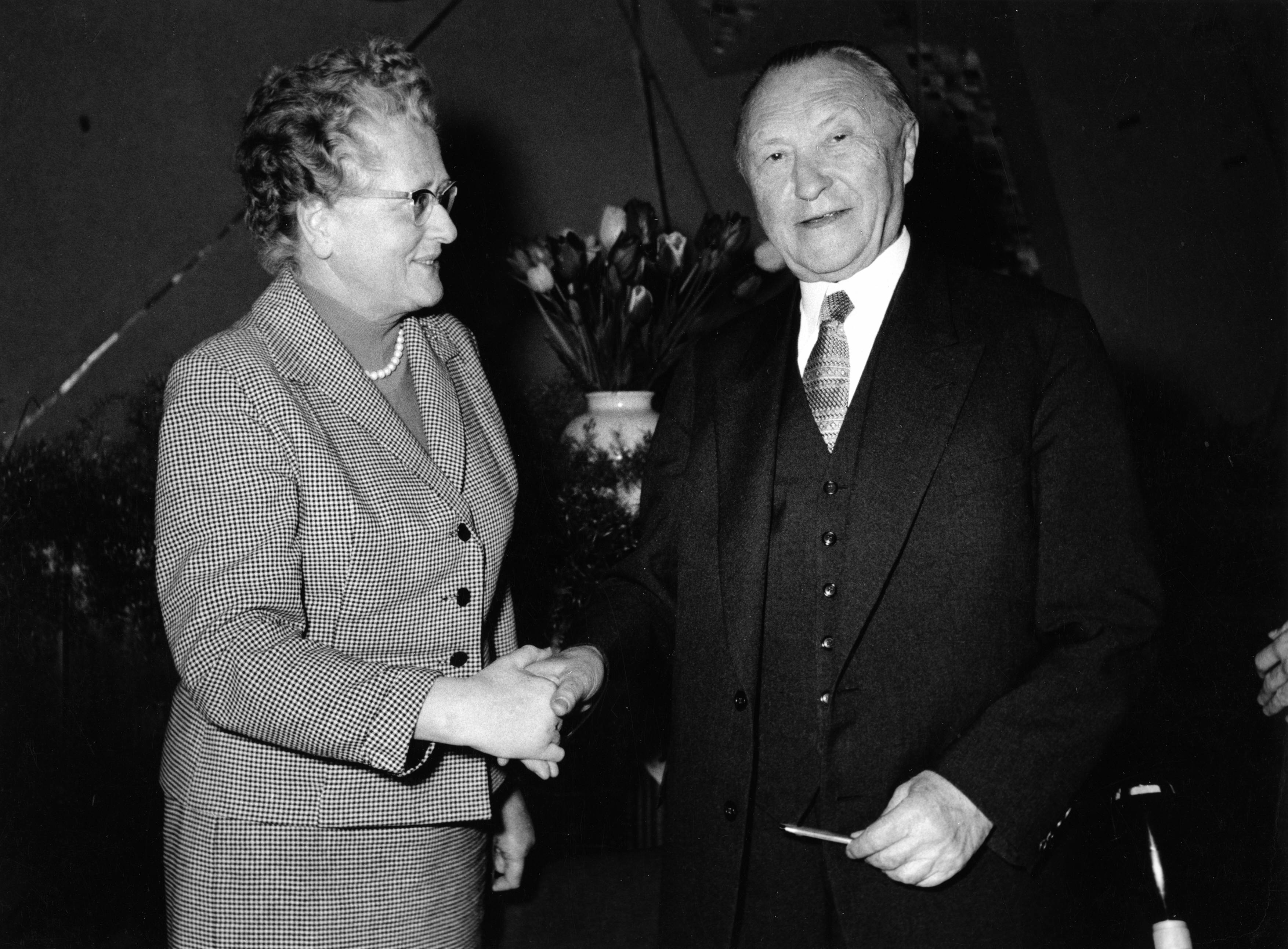 Adenauer, Konrad9. CDU-Bundesparteitag, 26.04.1960 - 29.04.1960